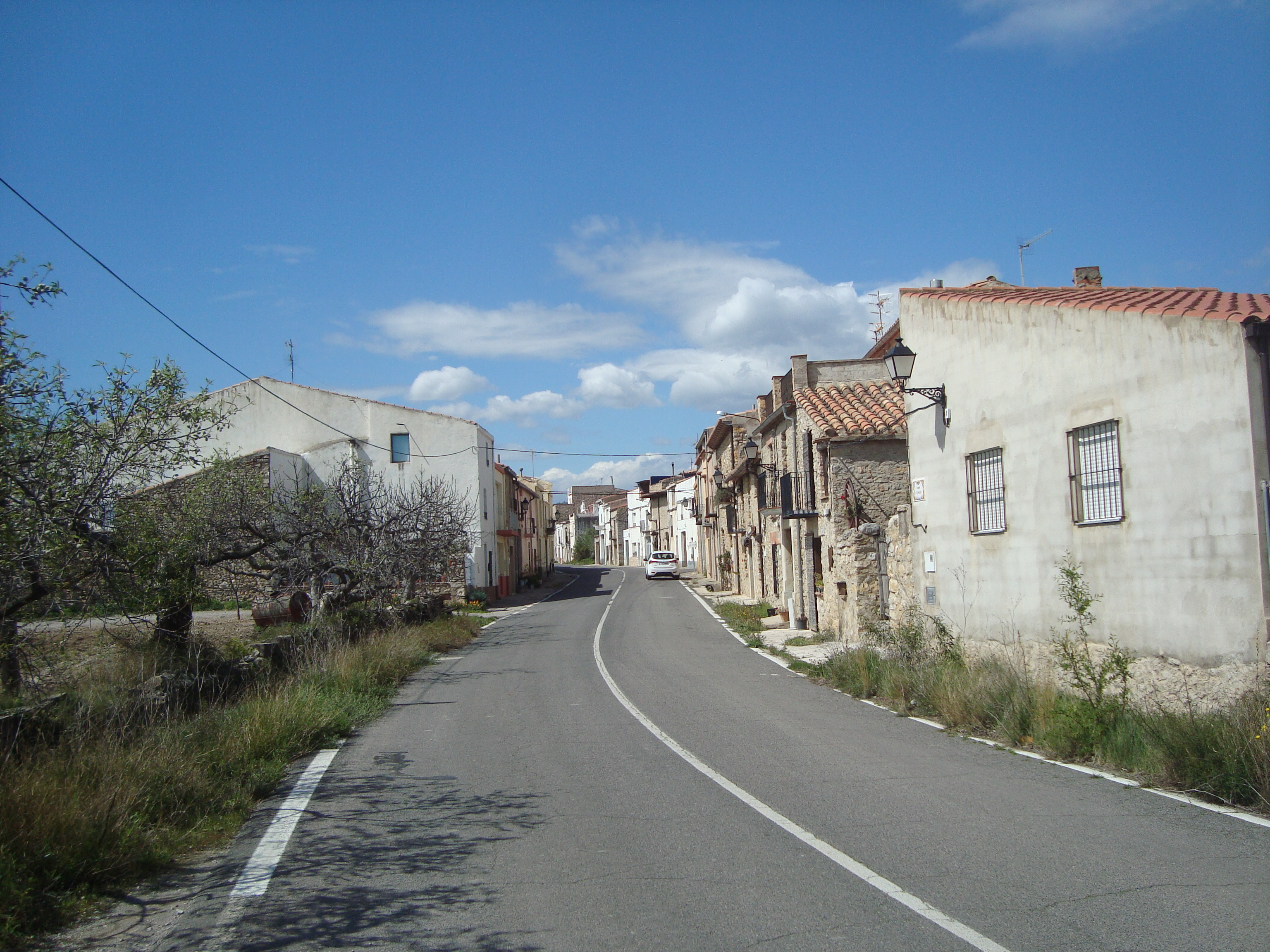 Barrio de Anroig (Xert)